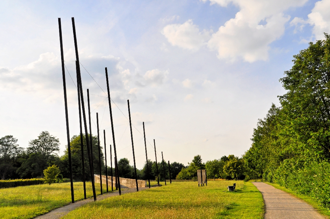 Hannover -KZ-Außenlager Ahlem